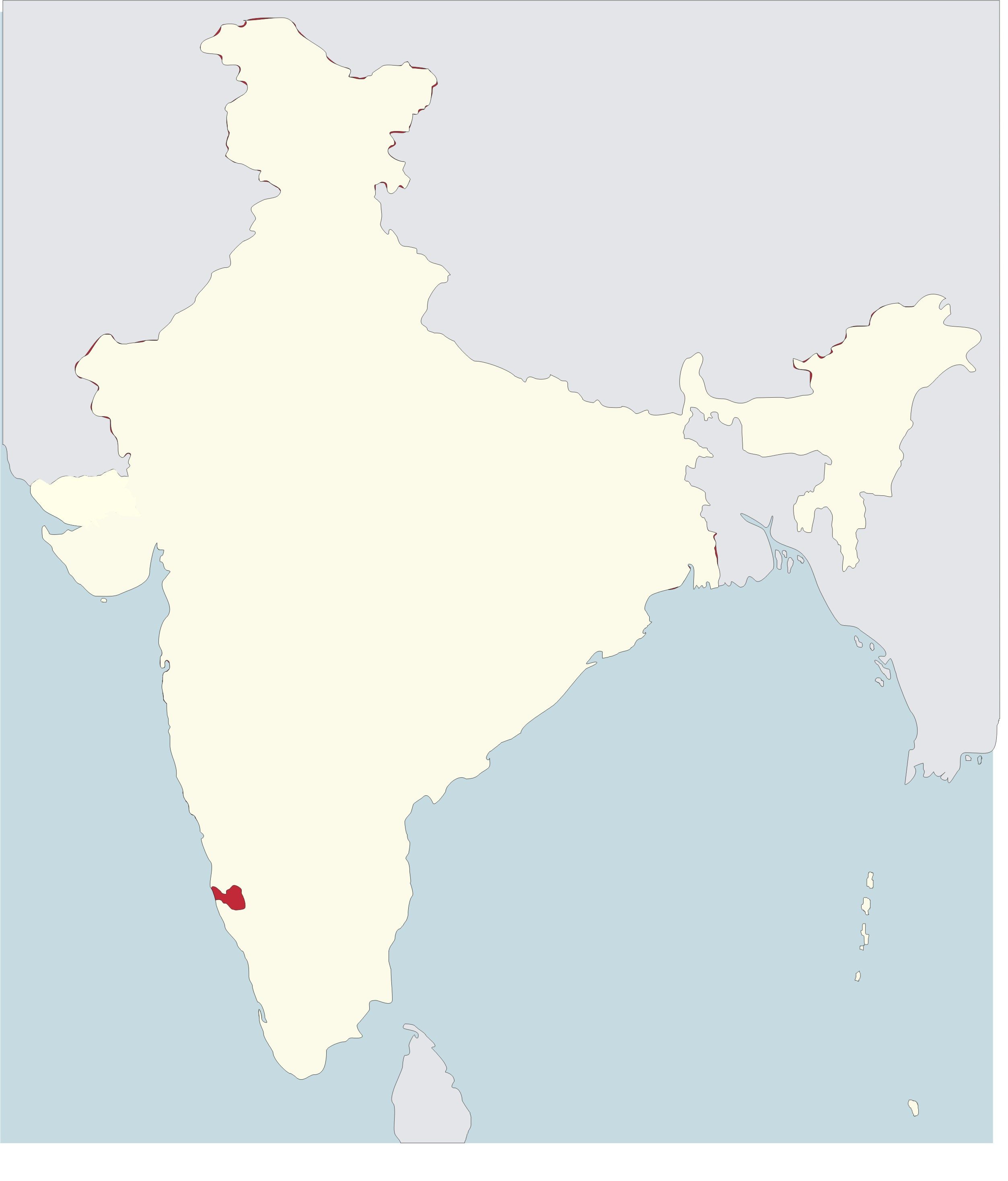 Mapa de la diòcesi de Mangalore a l'Índia